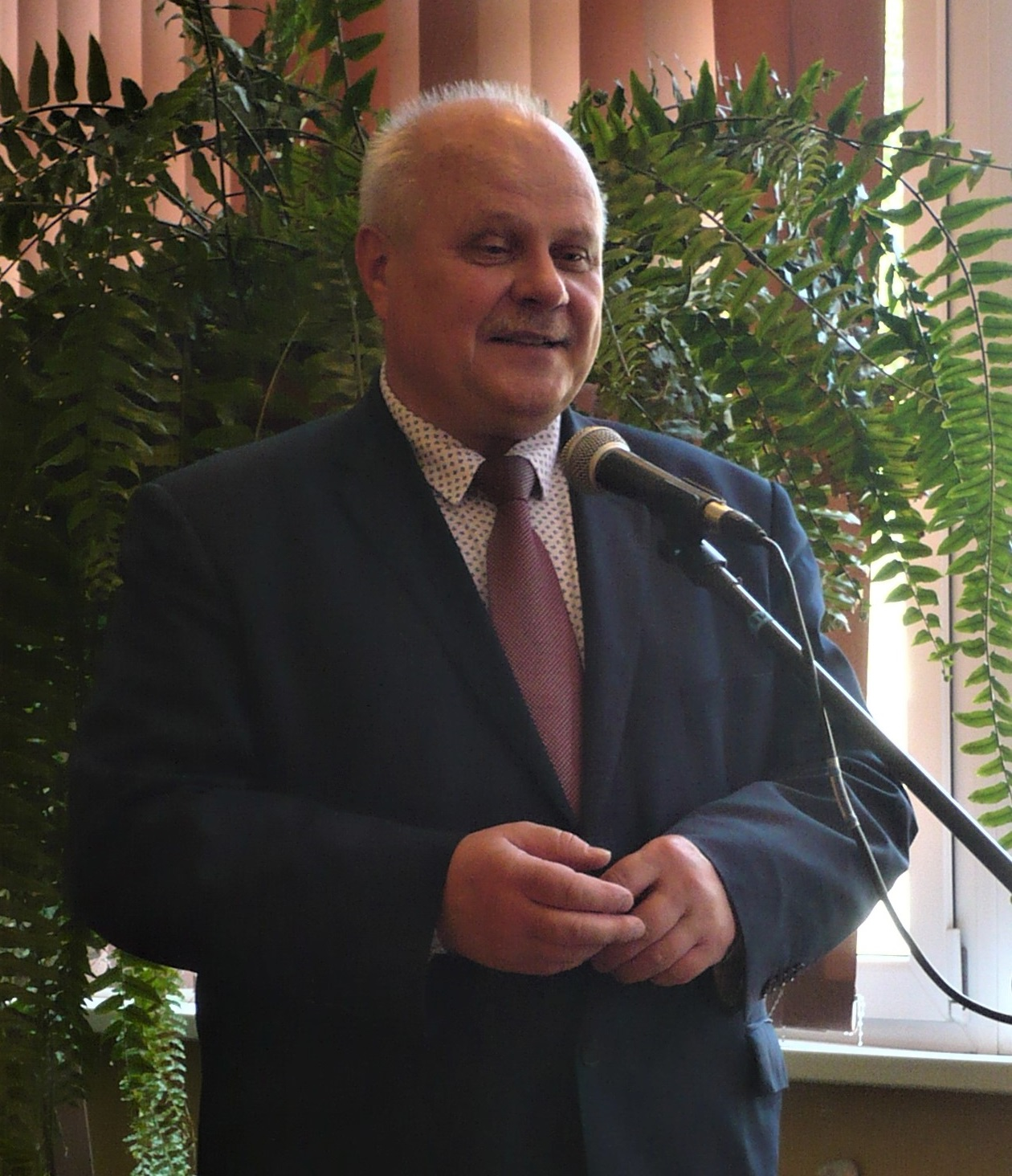 Marek Dyduch w Nowej Rudzie